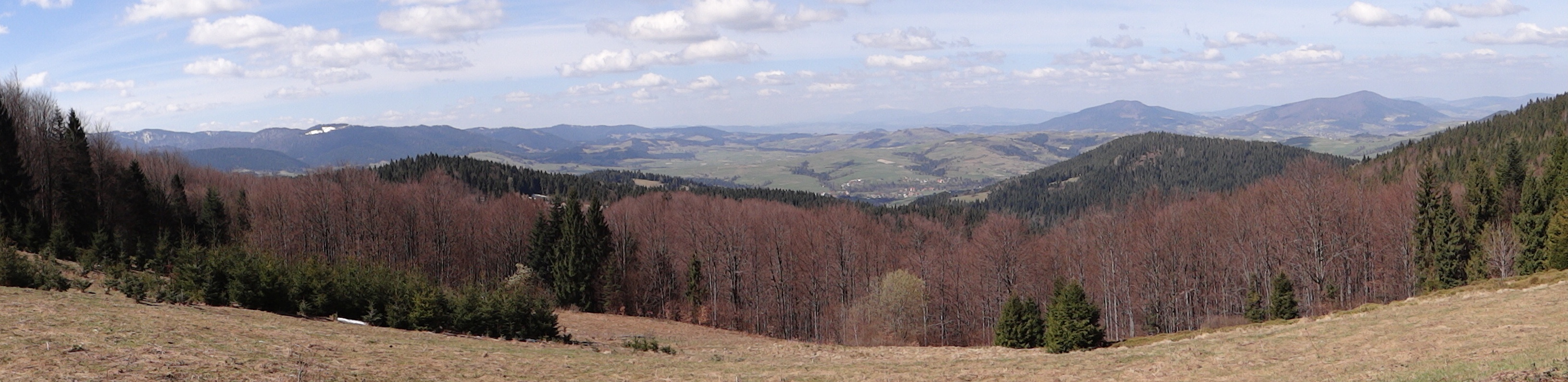 Panorama widokowa z Polany Folwarcznej pod Kobylicą